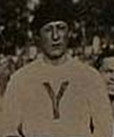 Recorte de de el jugador Casiano Chavarría.